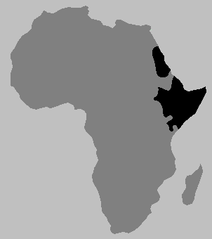 Кушитски езици